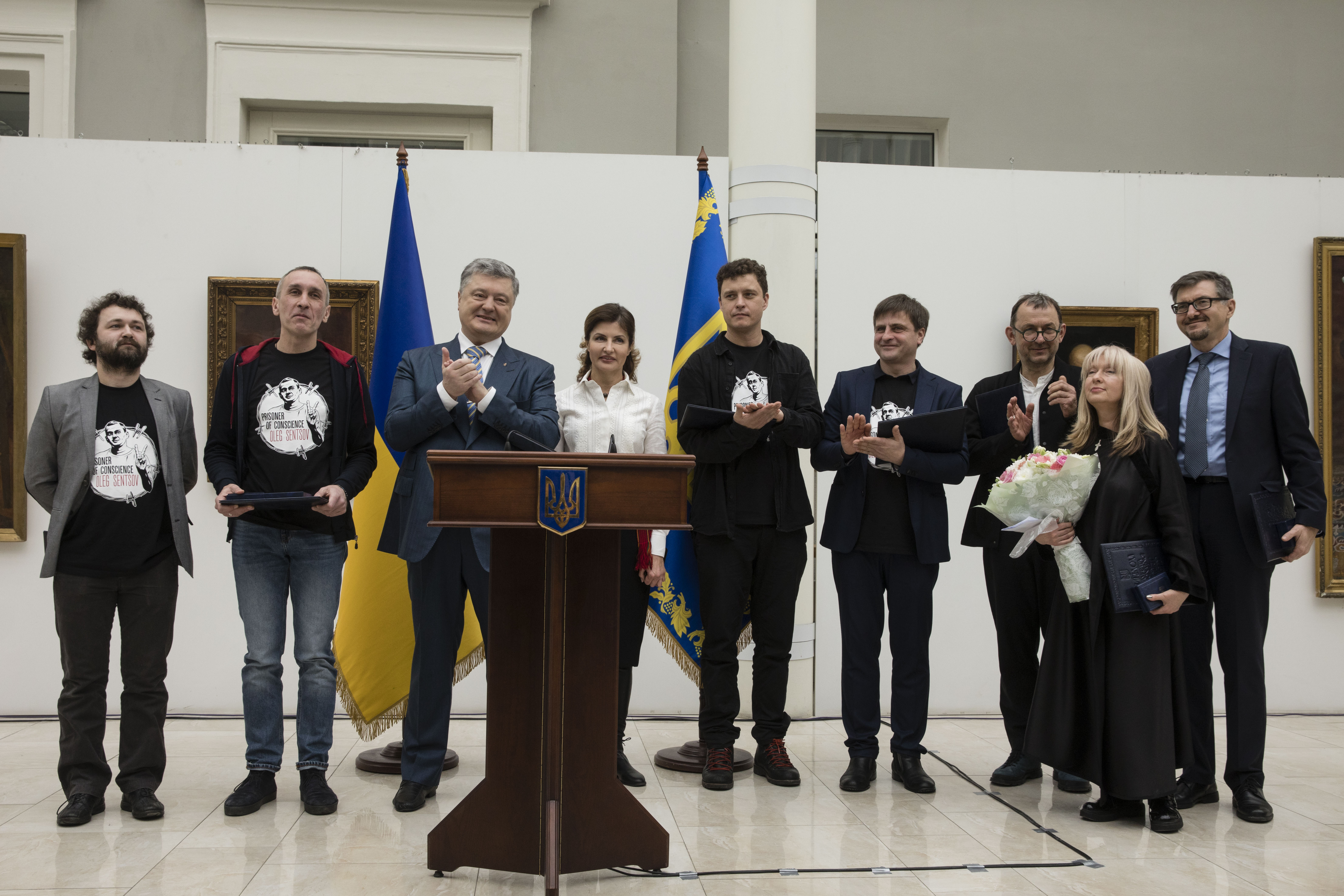 Лауреати Національної премії України імені Тараса Шевченка 2018 року разом з Президентом України Петром Порошенком та його дружиною Мариною Порошенко.